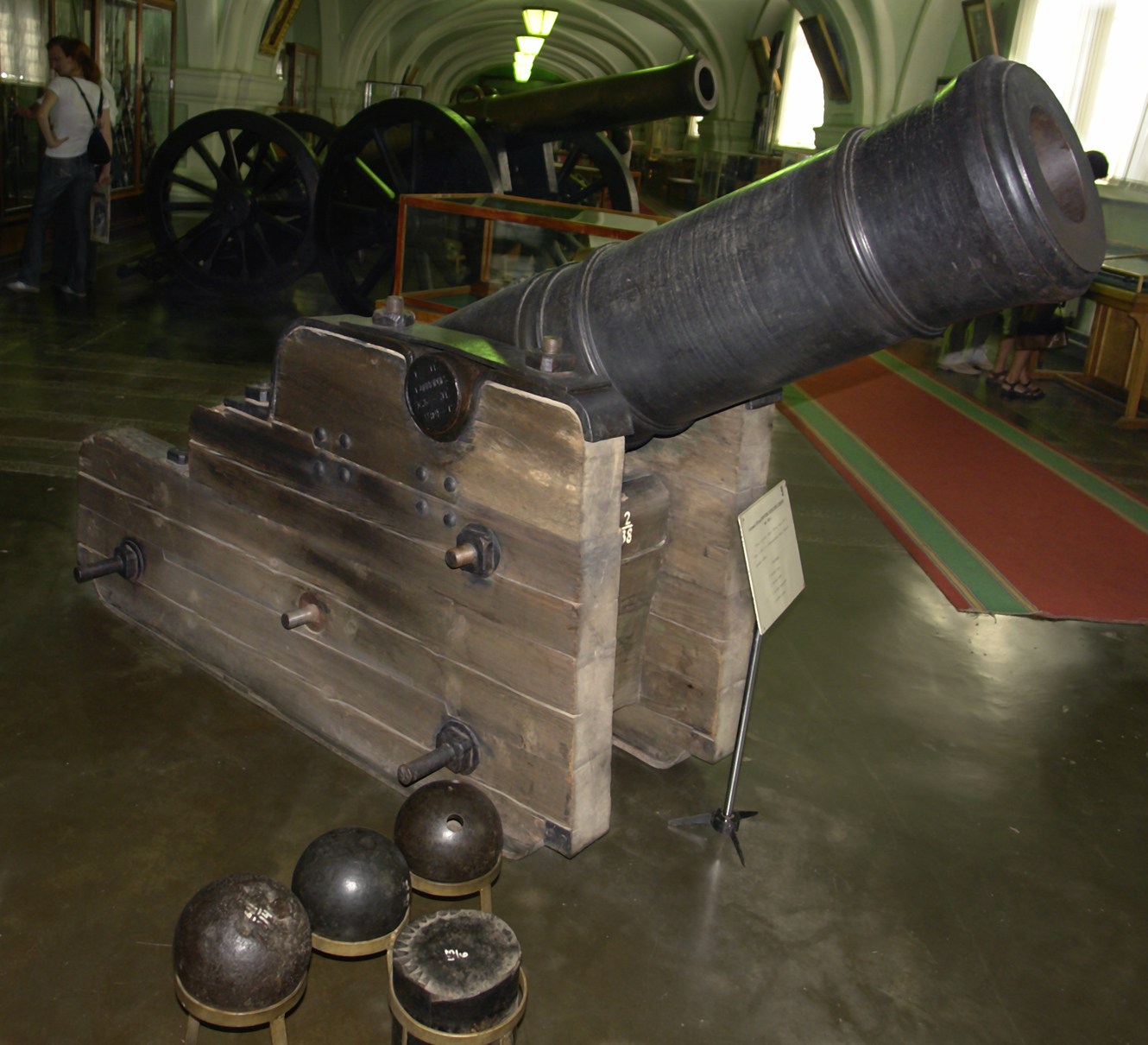 1-пудовый (197-мм) короткий крепостной единорог образца 1805 года (1814 г создания). Чугунный свол 239 мм, весом 1564 кг. Дальность 3200м. Снаряды: (слева направо, сверху вниз) 1-пудовое ядро. 1-пудовая бомба. 1-пудовый брандикугель, 1-пудовая картечь. Военно-исторический музей артиллерии, инженерных войск и войск связи, Санкт-Петербург.